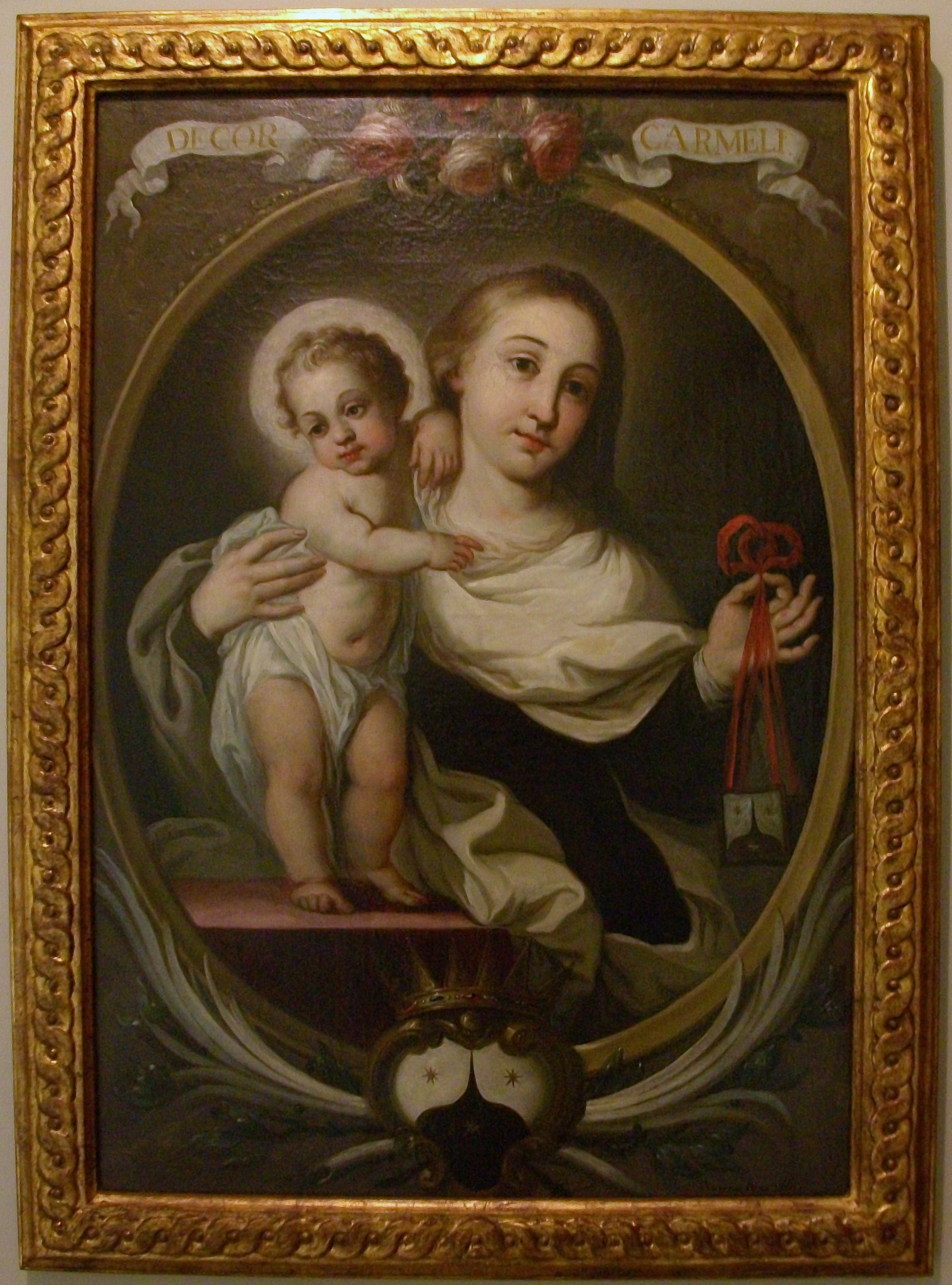 Catalan: Mare de Déu del Carme